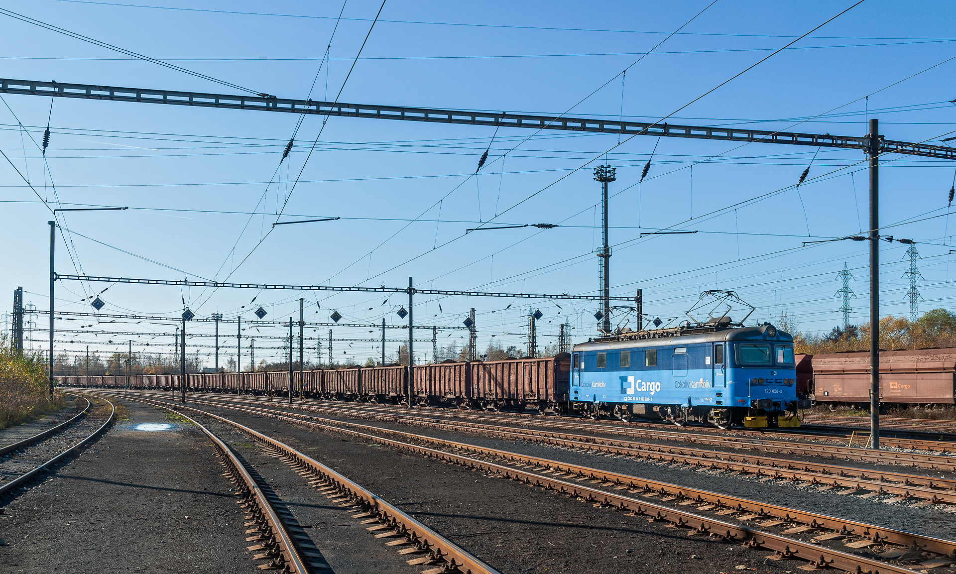 Elektrická lokomotiva řady 123 firmy ČD Cargo na seřazovacím nádraží Washington poblíž Mostu v čele uhelného vlaku.